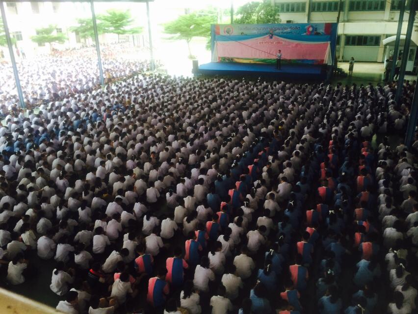 อาคารโดมเอนกประสงค์ โรงเรียนสวนกุหลาบวิทยาลัย รังสิต